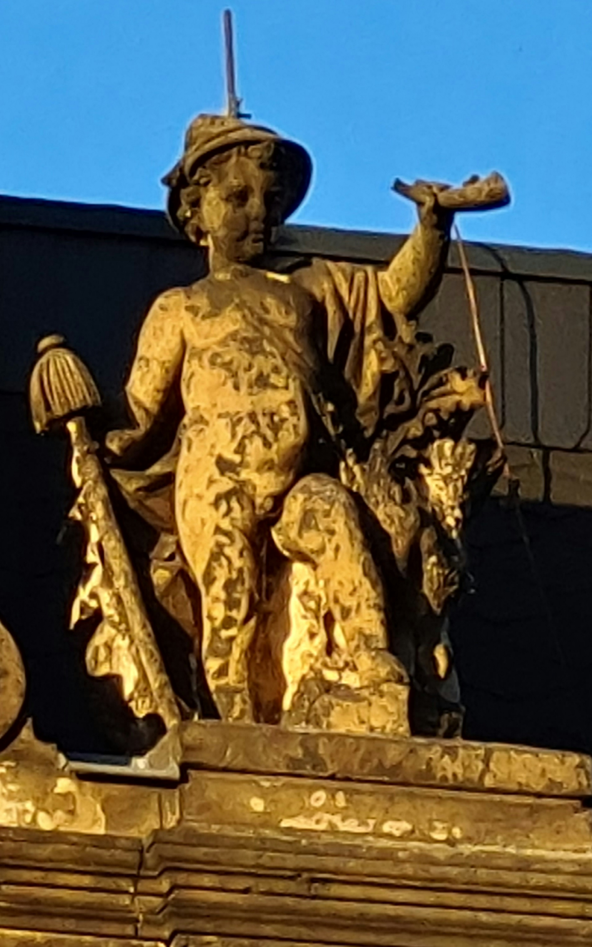 Blick Elbabgewandte Seite // Bild Juni 2019 // Ausführung 1875: Acht Sandsteinfiguren für die Villa Hartmann in Dresden Laubegast: Die streng symmetrische Villa, deren Fassaden vollständig aus Sandstein ausgeführt wurden, ist fünfachsig aufgebaut, wobei drei Fensterachsen die Mittelrisalite bilden. Diese werden durch Dachausbauten mit Sandsteinfiguren zusätzlich betont. Die Sandsteinfiguren wurden von Prof. Rentzsch entworfen und vom Bildhauer Franz Schwarz ausgeführt.